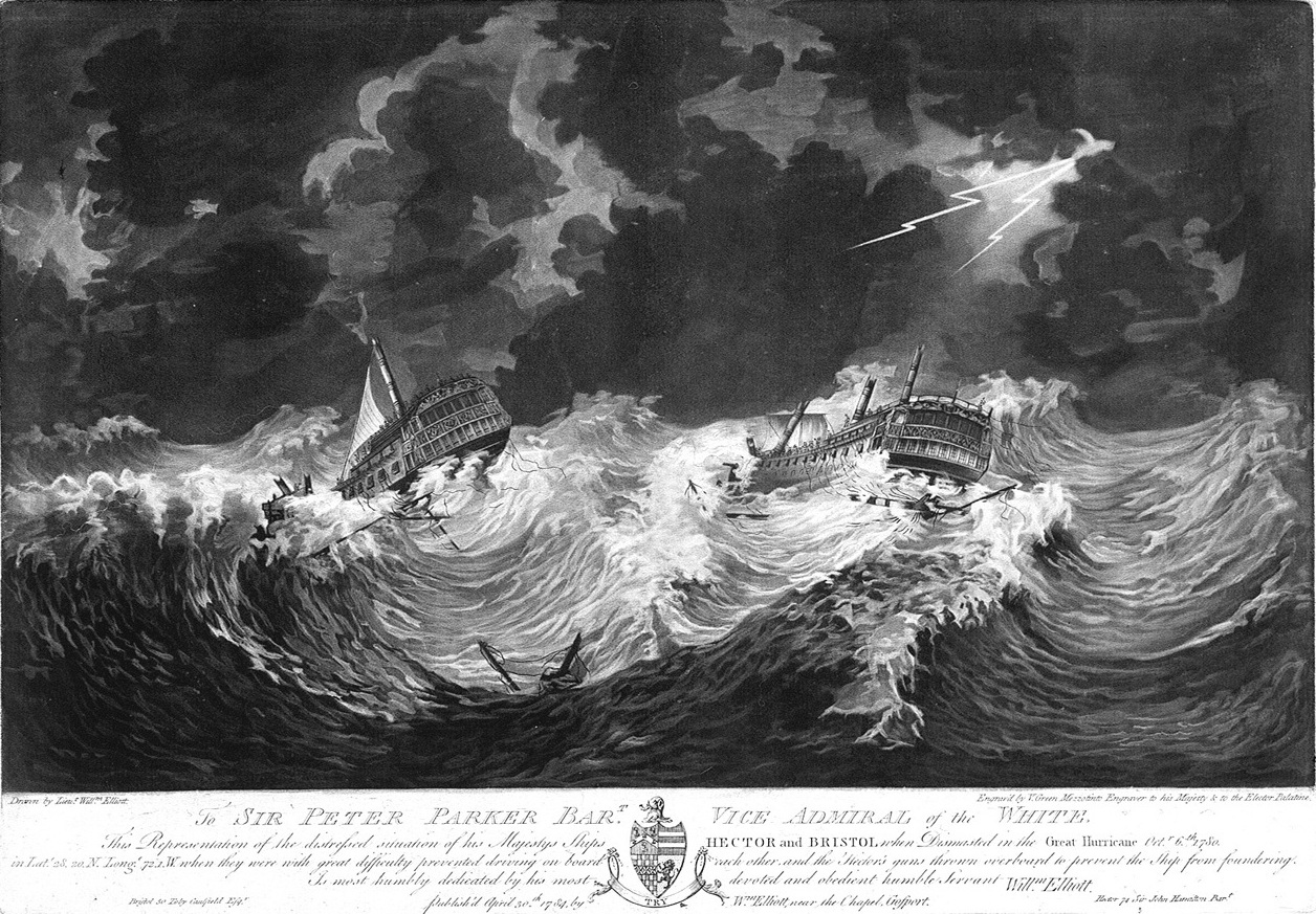 Les vaisseaux anglais l’Hector et le Bristol en détresse lors du grand ouragan de 1780.